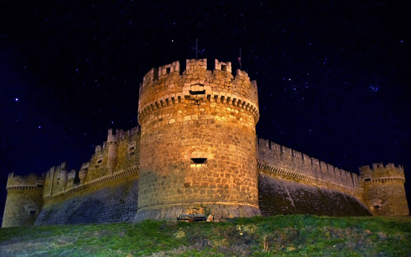 Es el castillo de Grajal de Campos en León visto por la noche.